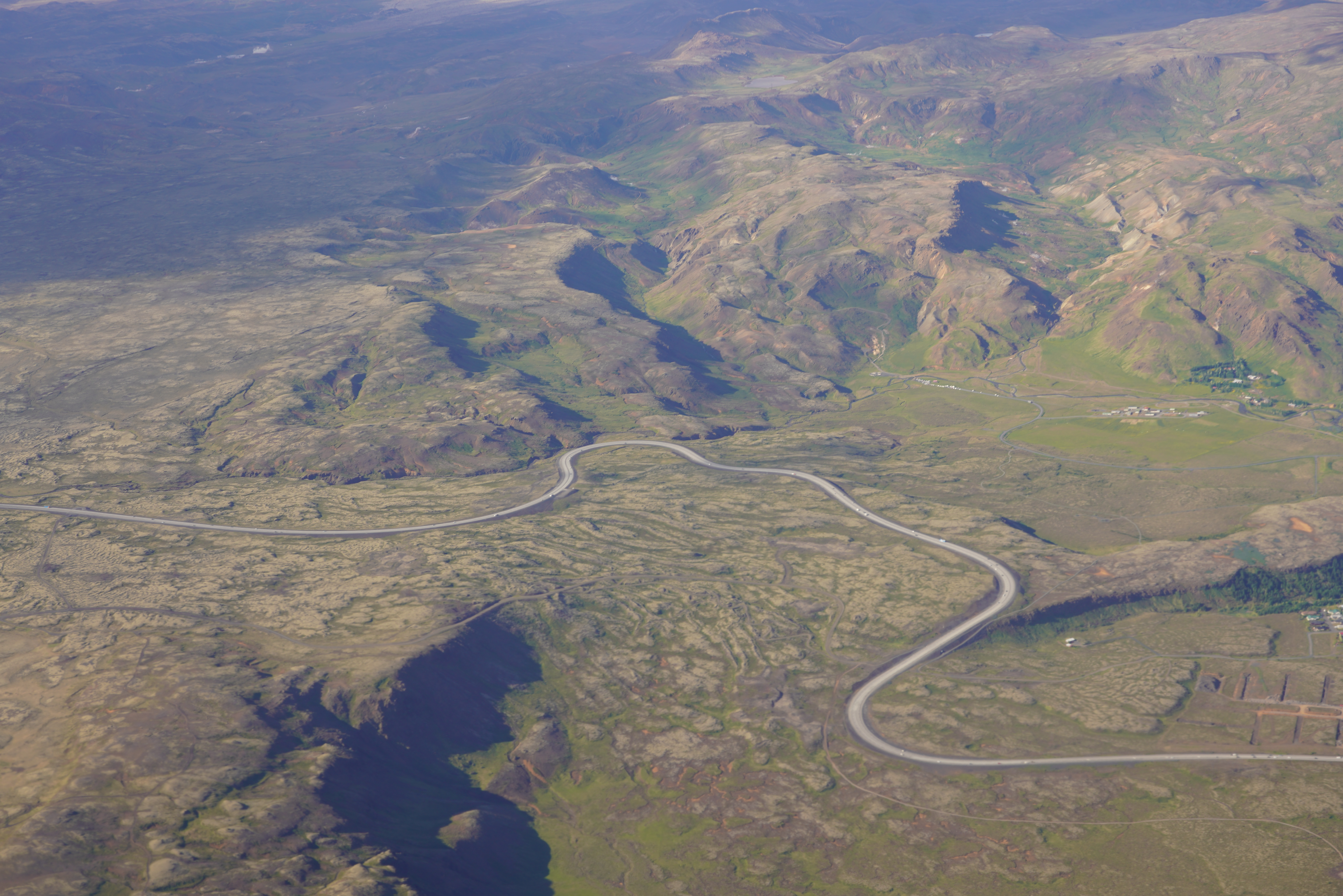 Icelandic aerial-view